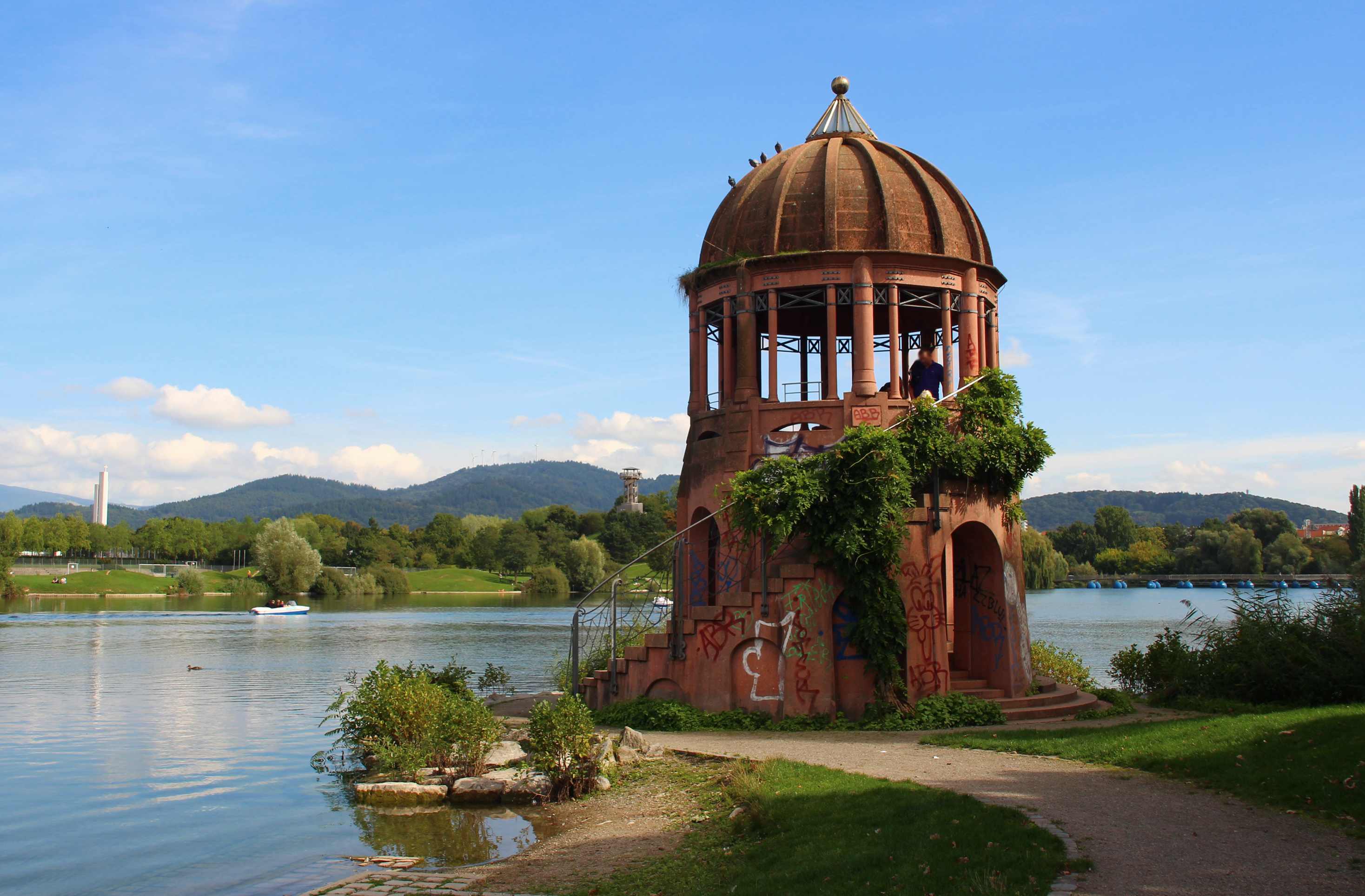 Tempelchen am südwestlichen Ufer des Flückigersee in Freiburg